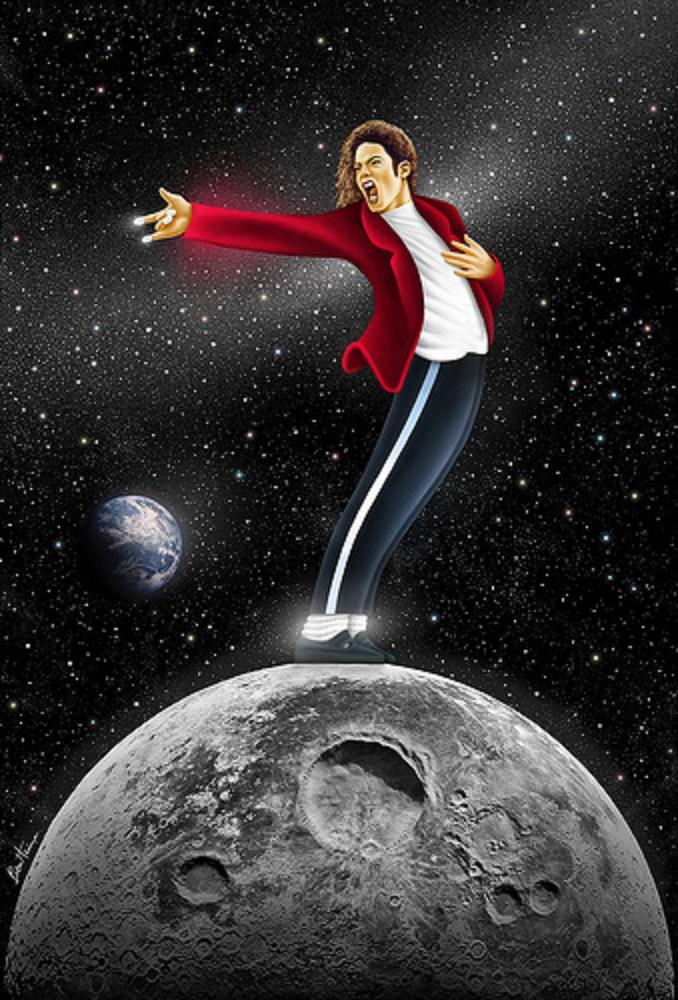 Portrait: Michael Jackson, I N V I N C I B L E (Ben Heine)